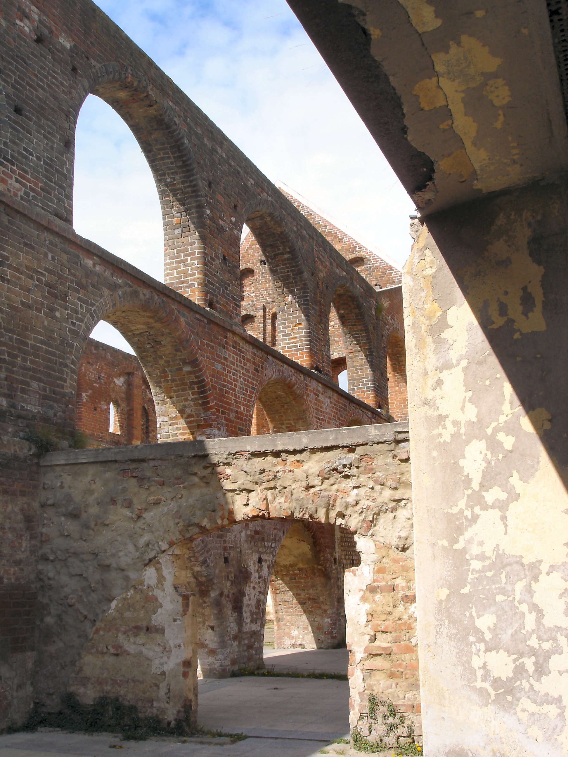 Kloster Doberan Wirtschaftsgebäude / Monastery Doberan, farm building